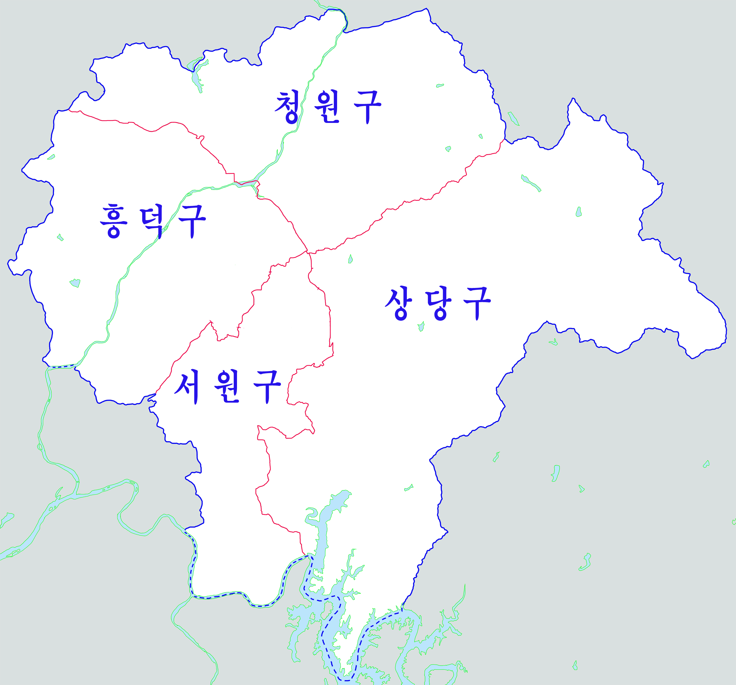 청주시행정도